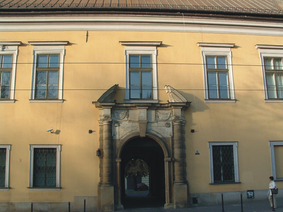 Pałac biskupi w Krakowie 23-10-2004r.